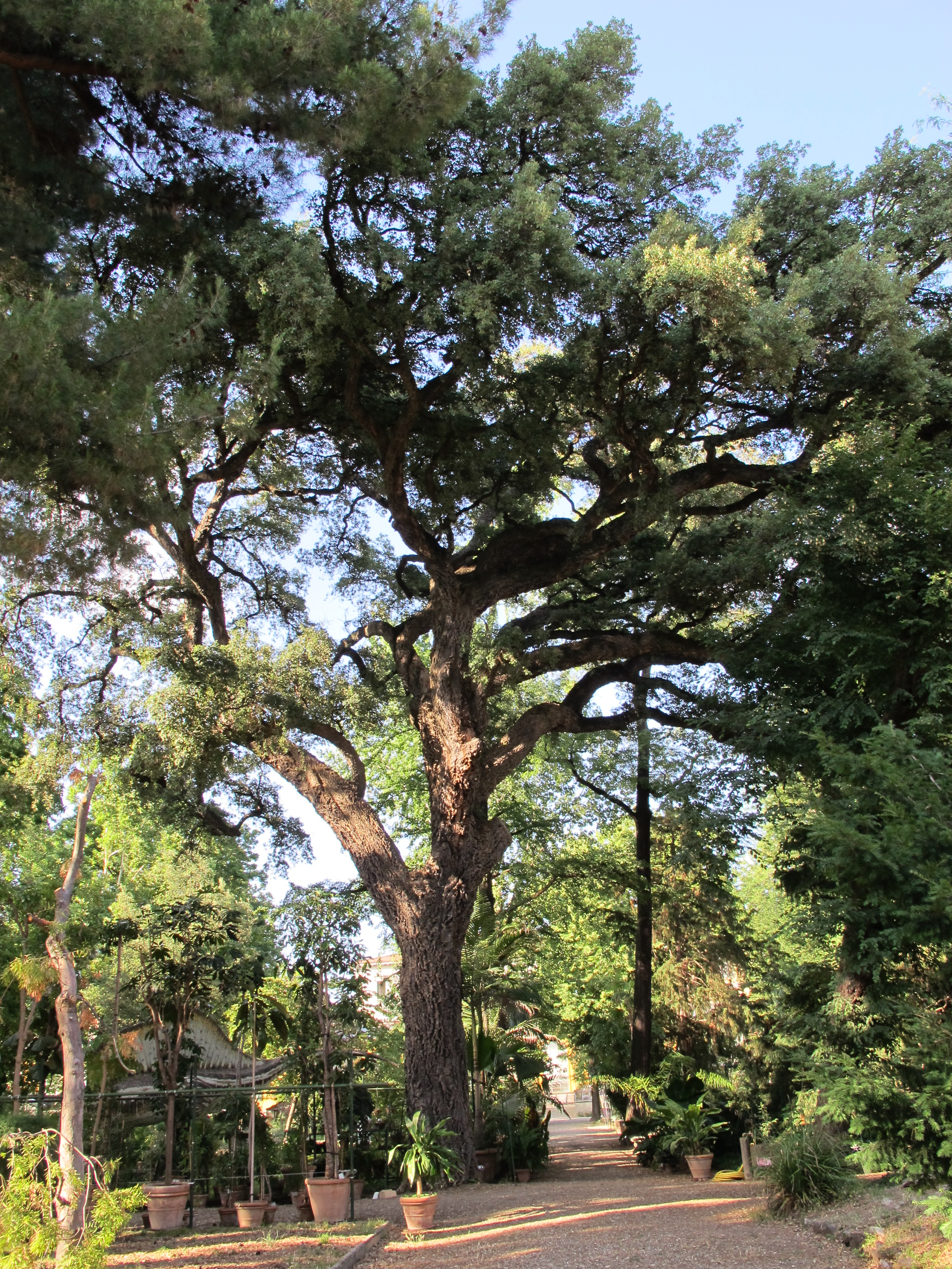 Giardino dei semplici, quercus suber